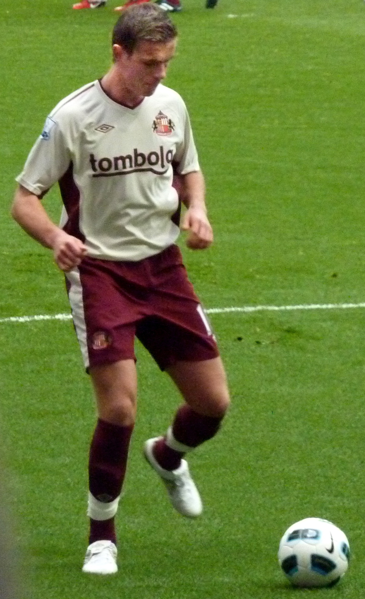 Jordan Henderson from Arsenal vs Sunderland